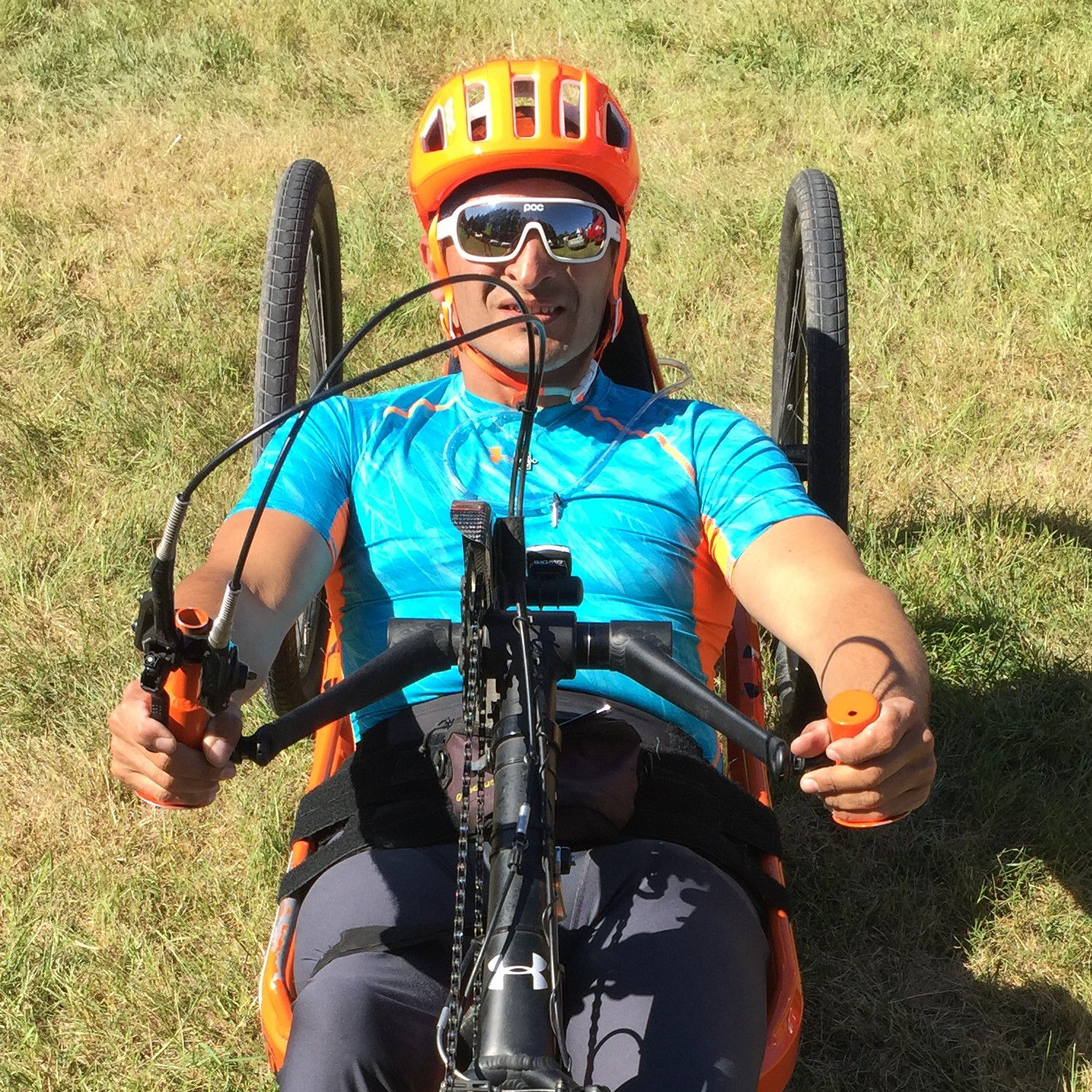 Pavel Děcký - handicapovaný sportovec na handbiku.